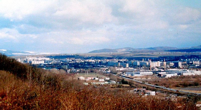 Na východnom okraji Šarišskej vrchoviny, na kopci Furča nad obcou Haniska, okr.Prešov, stojí monumentálny Pamätník sedliackeho povstania, región Šariš.Pohľad od pamätníka smerom na mesto Prešov, časť sídliska Sekčov a Šváby. Obrázok z roku 2005